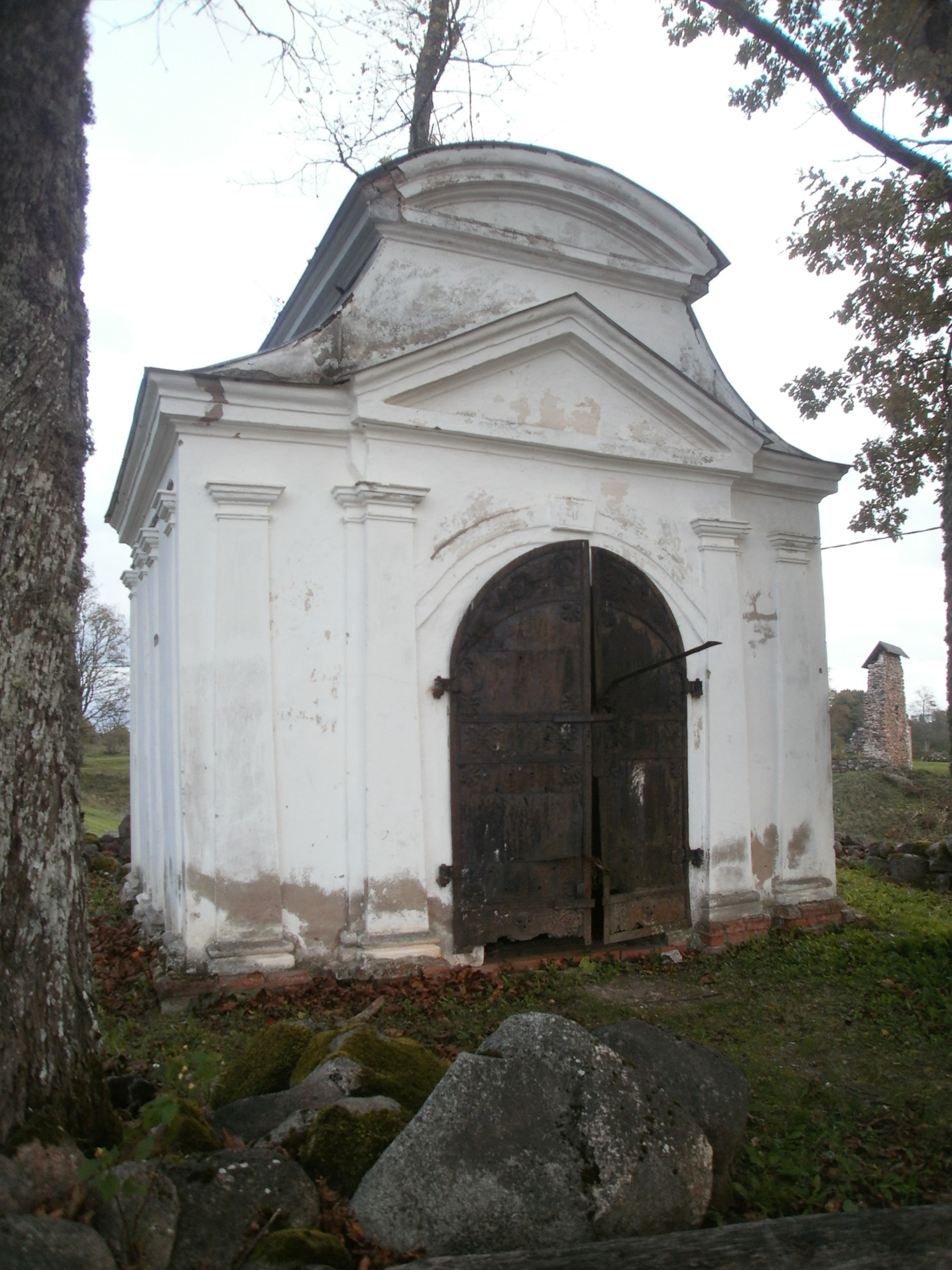 Kabeli esikülg loodest.